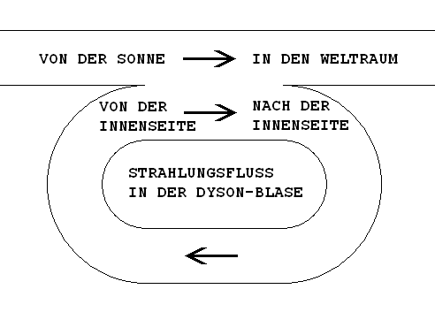 Strahlungs-Leistungs-Bilanz in einer Dyson-Blase